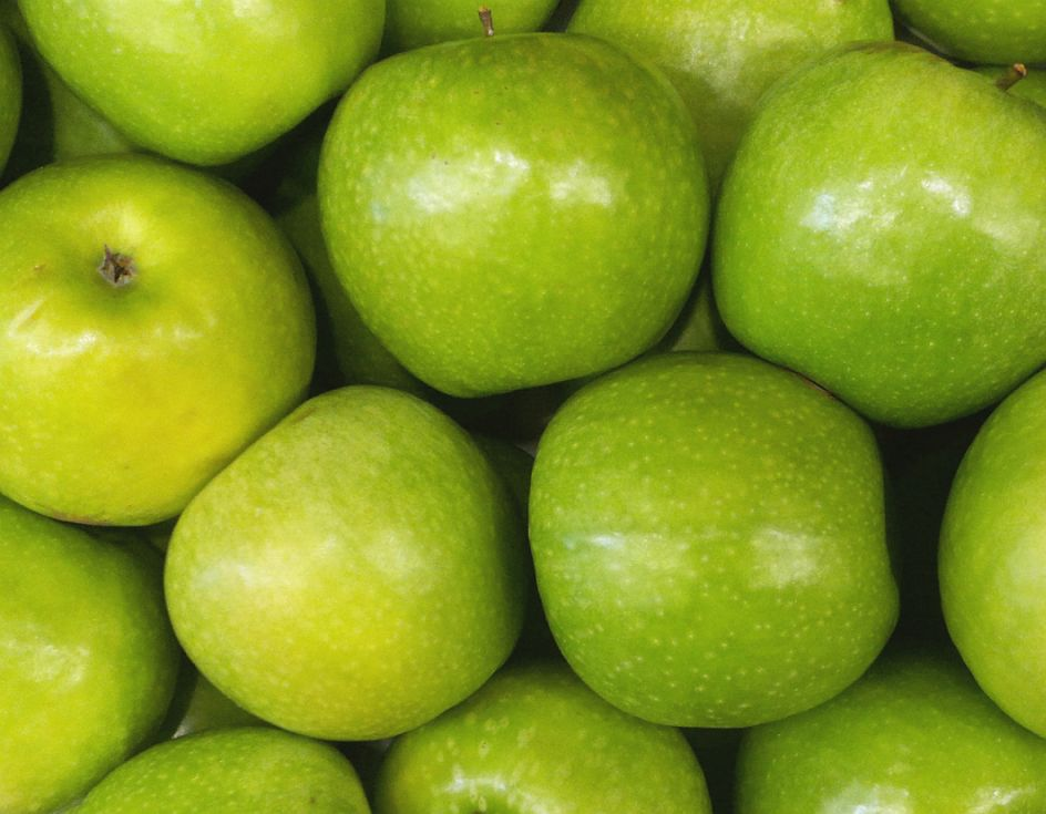 Pomes de la varietat Granny Smith Girona.